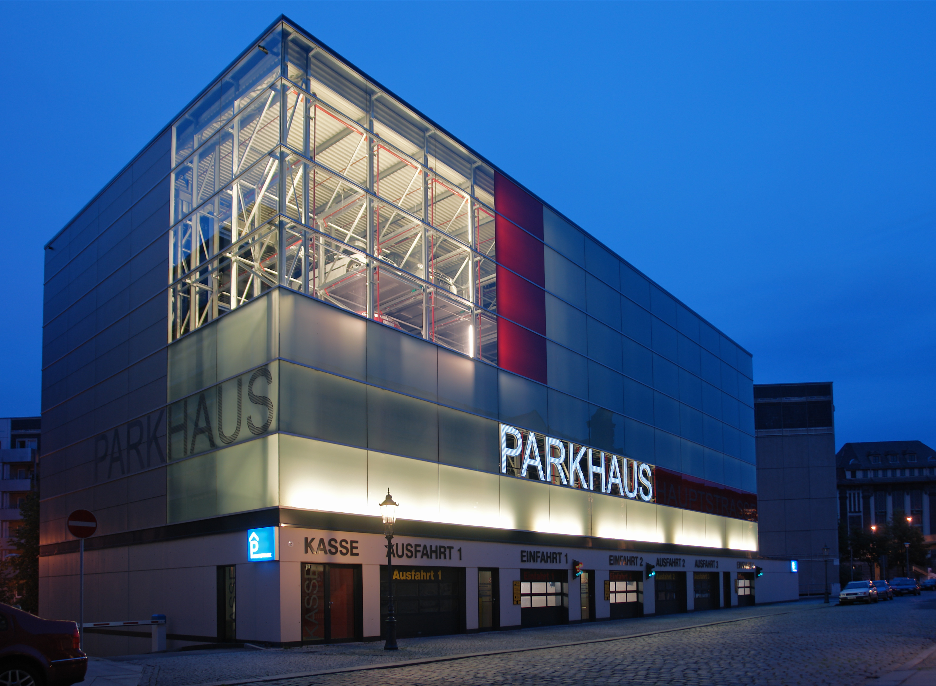 vollautomatisches Parkhaus in Dresden-Neustadt